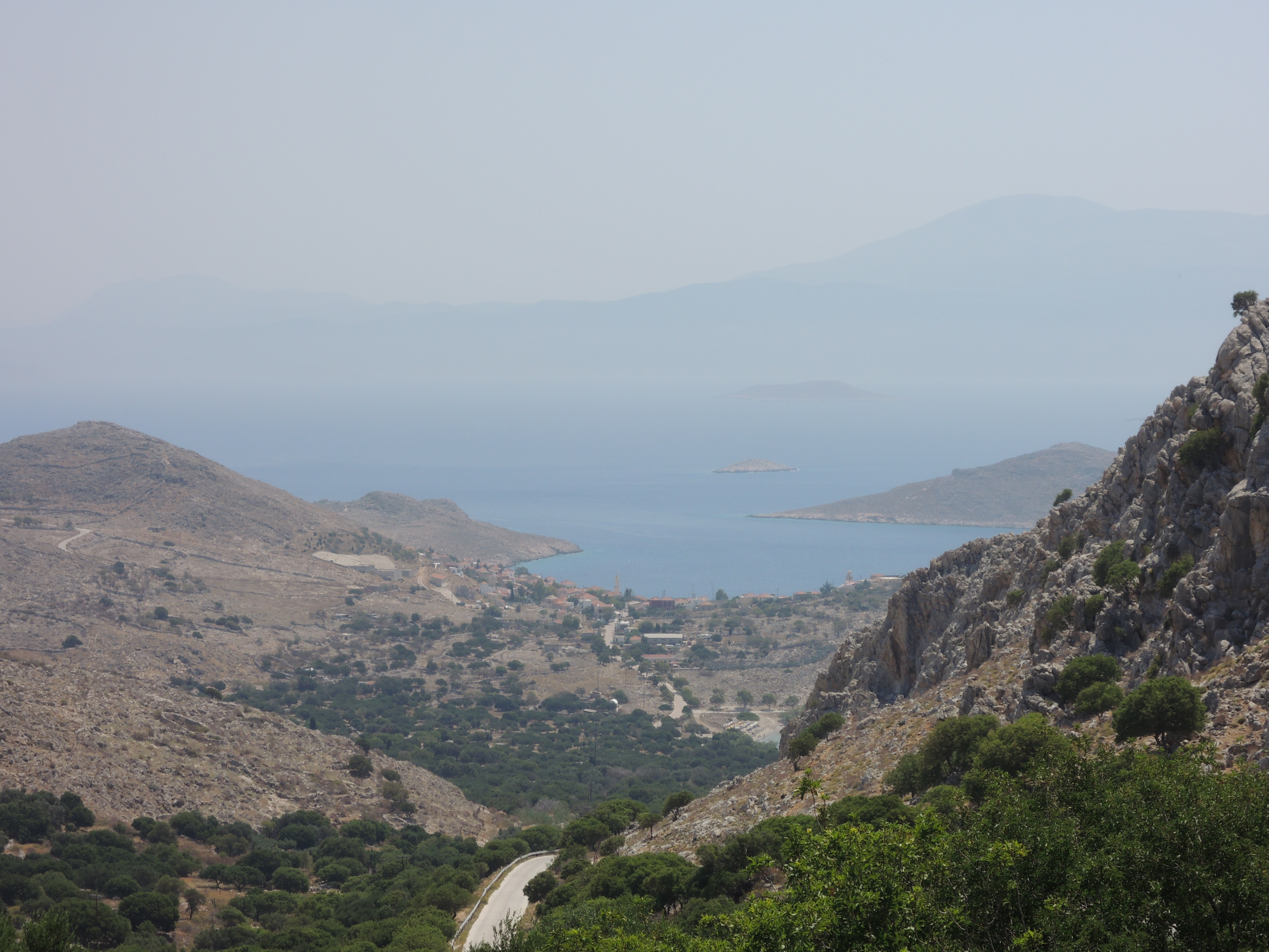 Халки. Вид на Нимборьо и окрестности от подступов к крепости